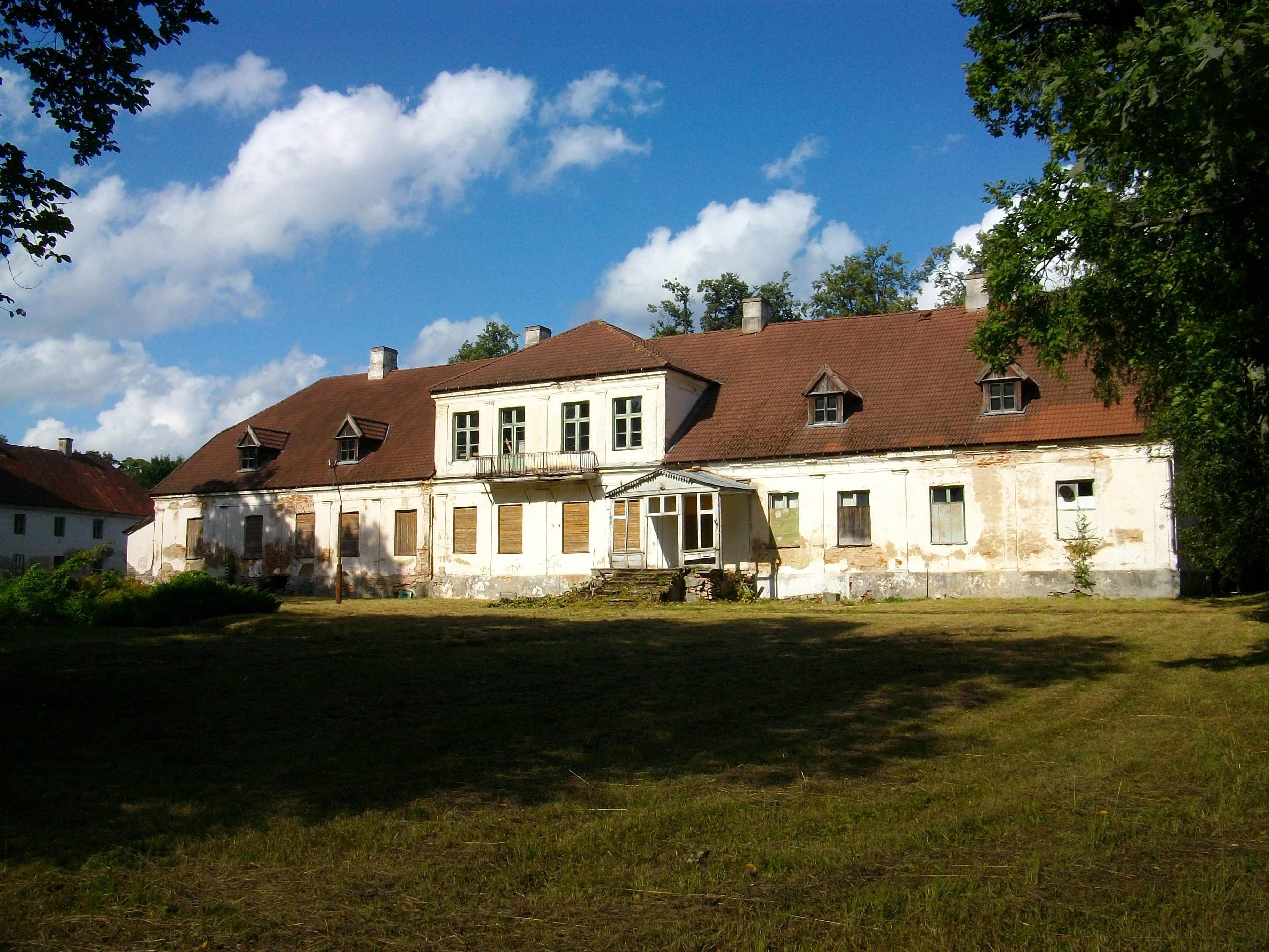 Uue-Põltsamaa mõisa peahoone, Veski tn 7 Põltsamaal